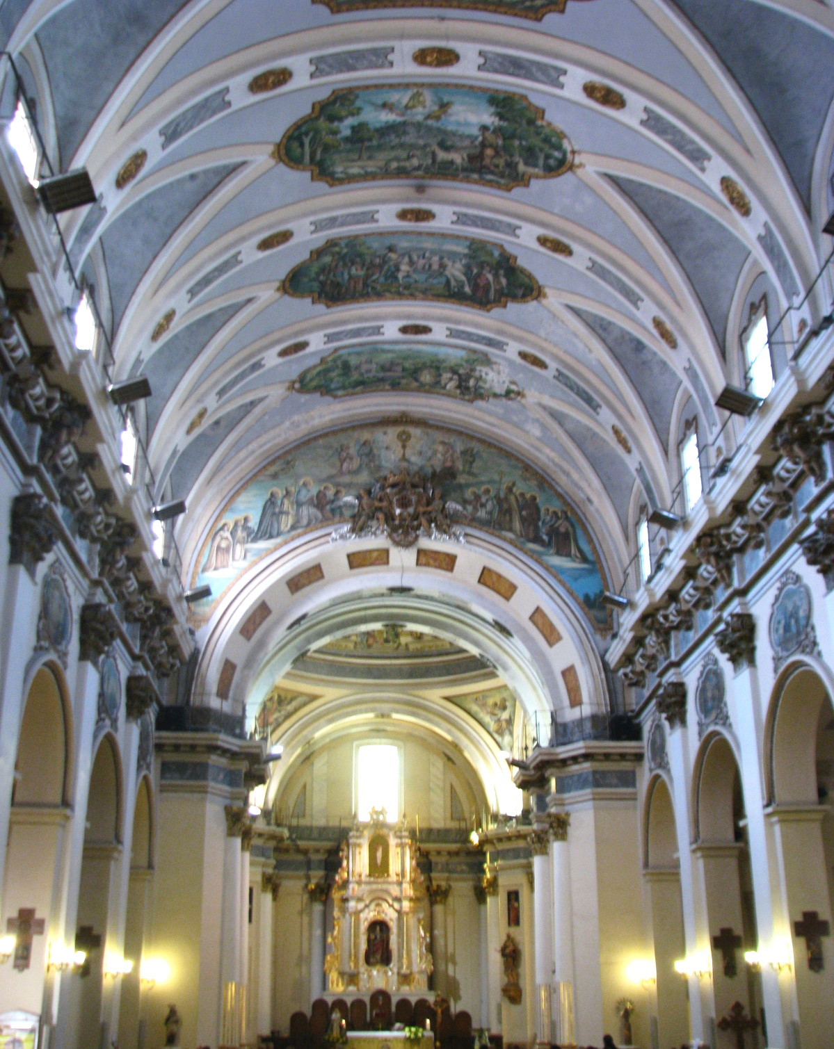 Nave central y altar mayor de la Iglesia Arciprestal de Santa Catalina (Alcira)